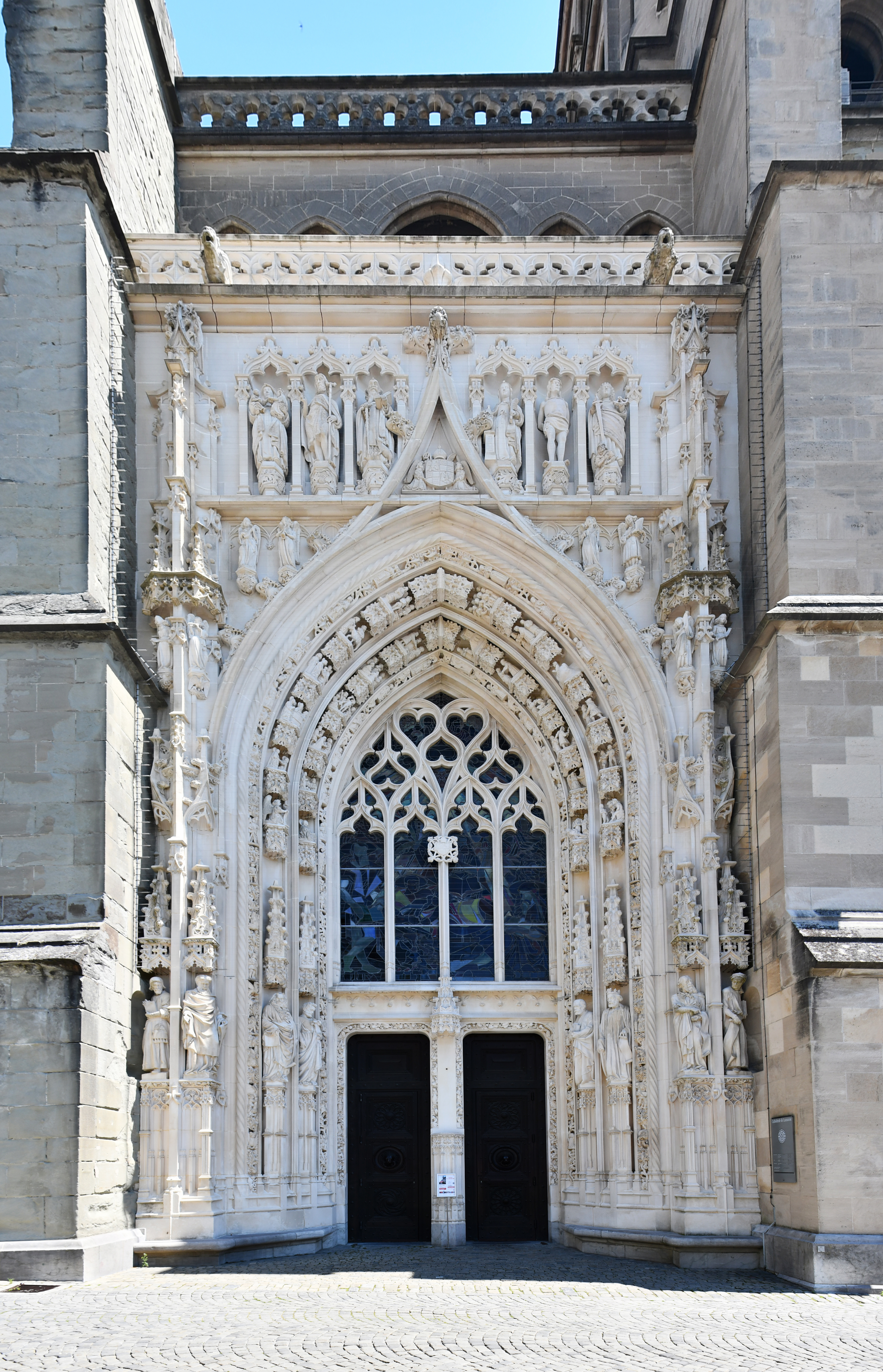 Portail principal (dit portail Montfalcon) de la cathédrale de Lausanne (Suisse).